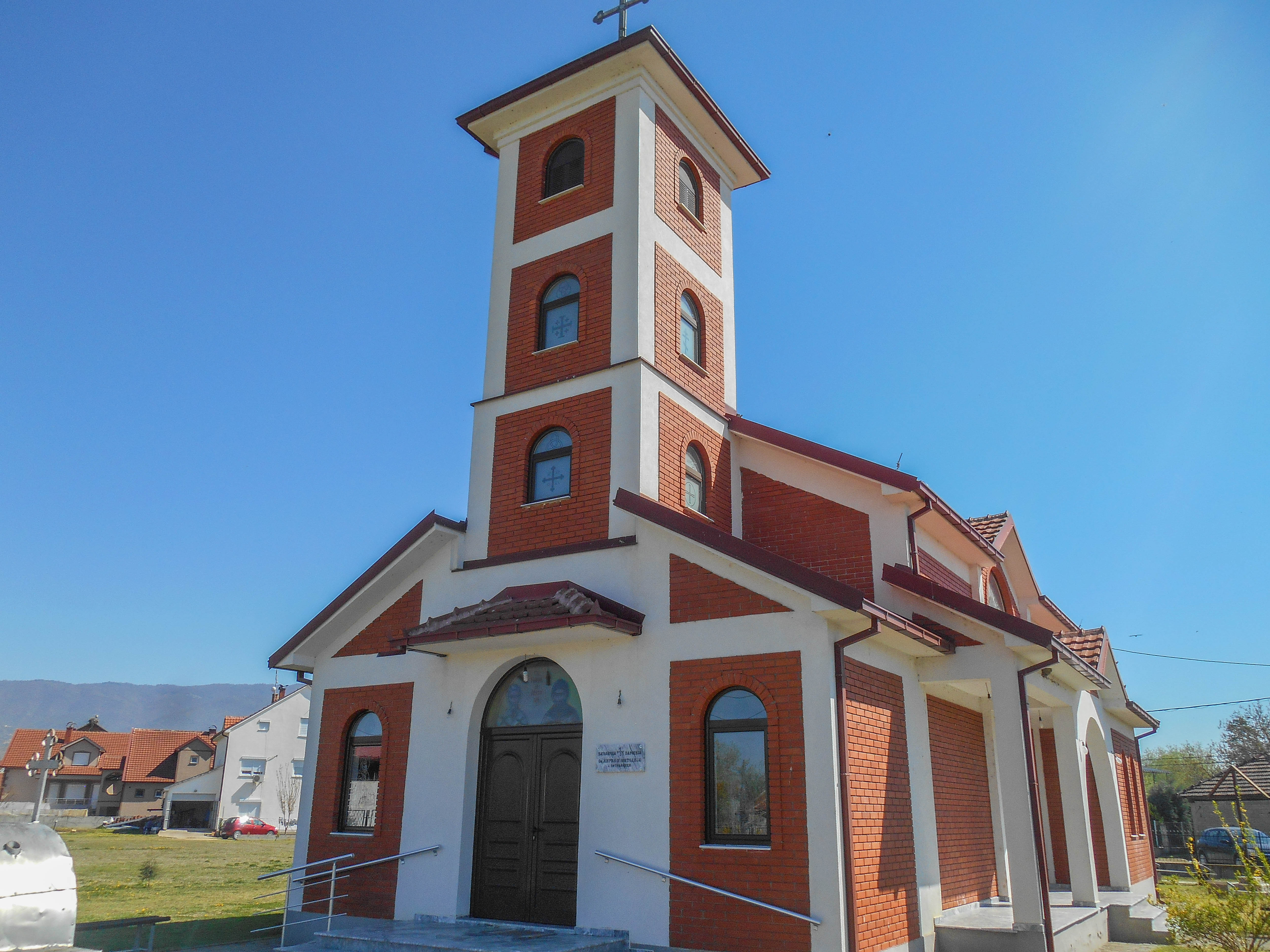 Црква „Св. Кирил и Методиј“ - Петралинци